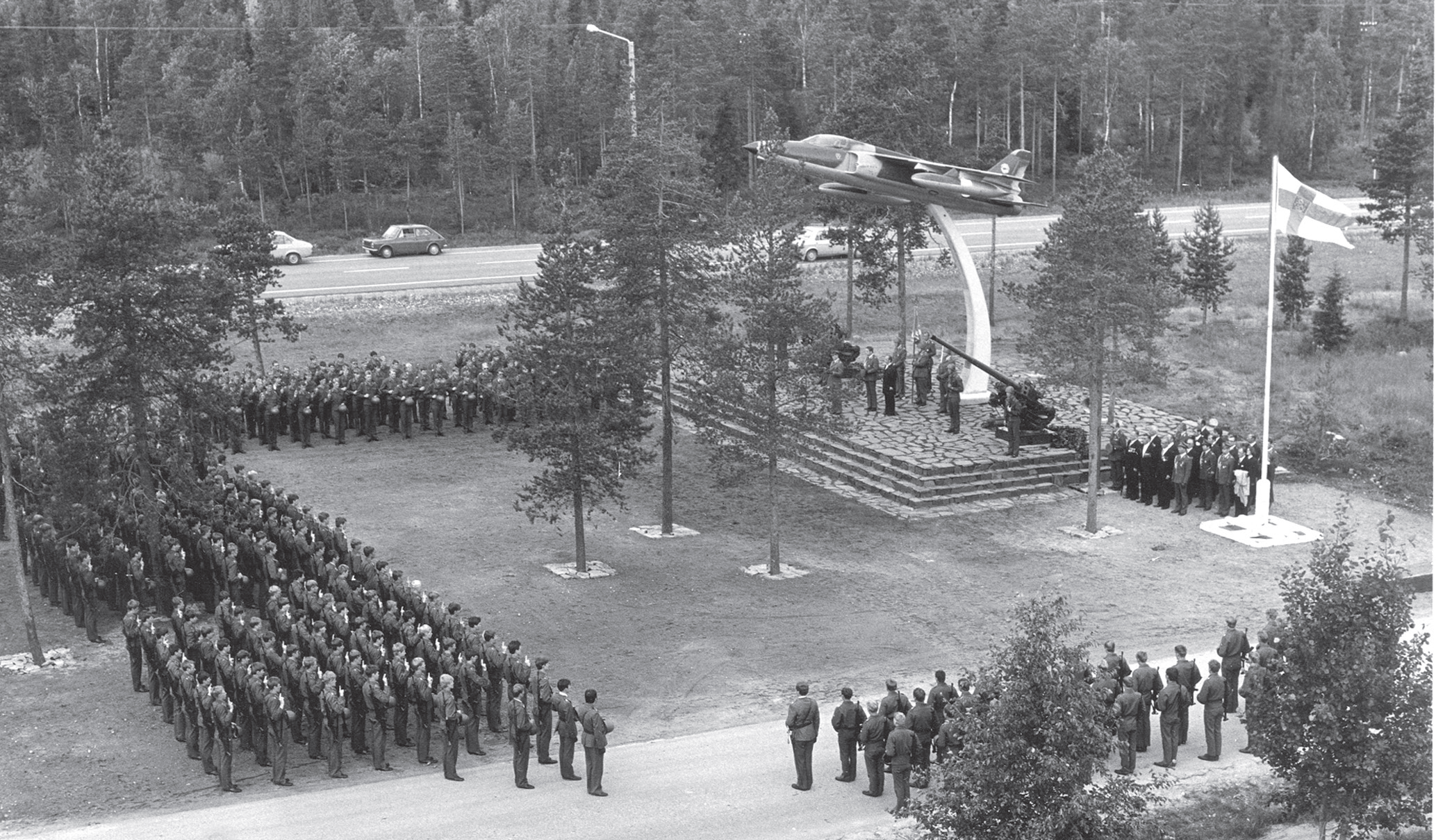 Ilmapuolustusmuistomerkin paljastus ja sotilasvala Someroharjulla 20.7.1979. Paljastuksen suoritti patteriston pitkäaikainen komentaja everstiluutnantti evp Arnold Airakorpi kutsuvieraiden ja varusmiesten läheisten läsnäollessa.